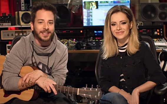 Sandy e Junior para a ELO em 2019